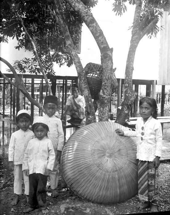 Negatief. Kinderen op de markt van Negara, Zuid-Kalimantan